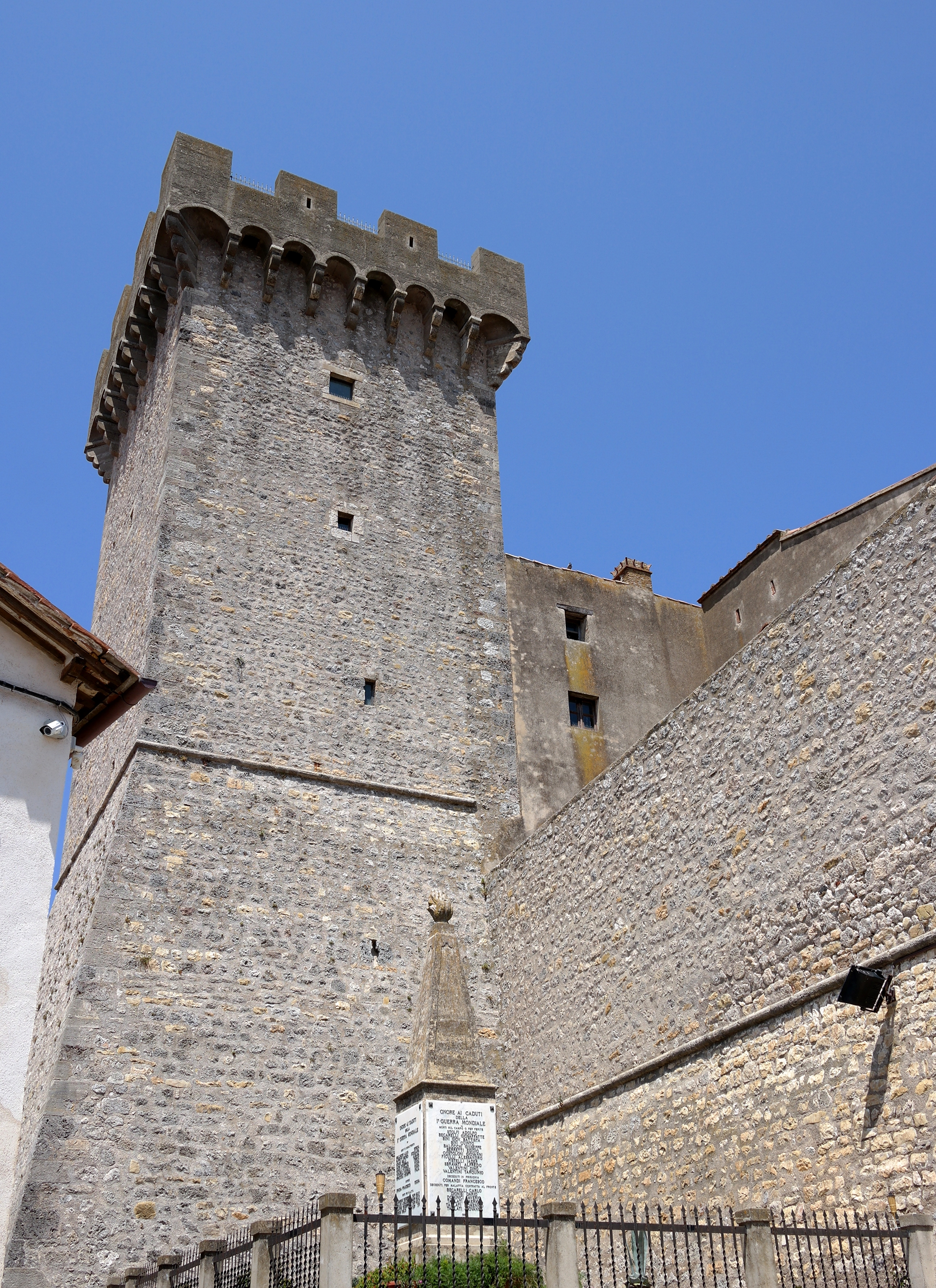 Rocca aldobrandesca di Capalbio